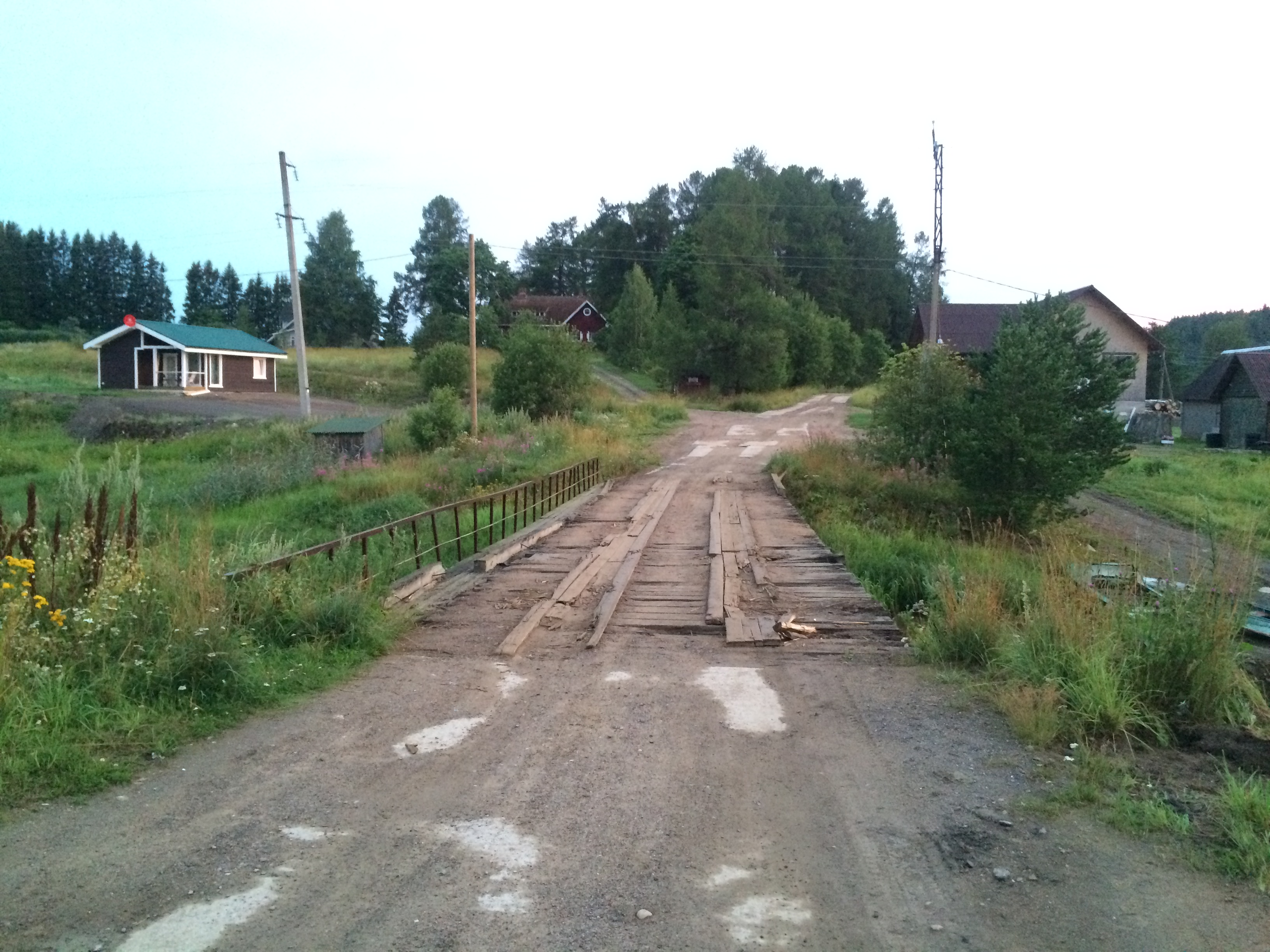 Савийоки